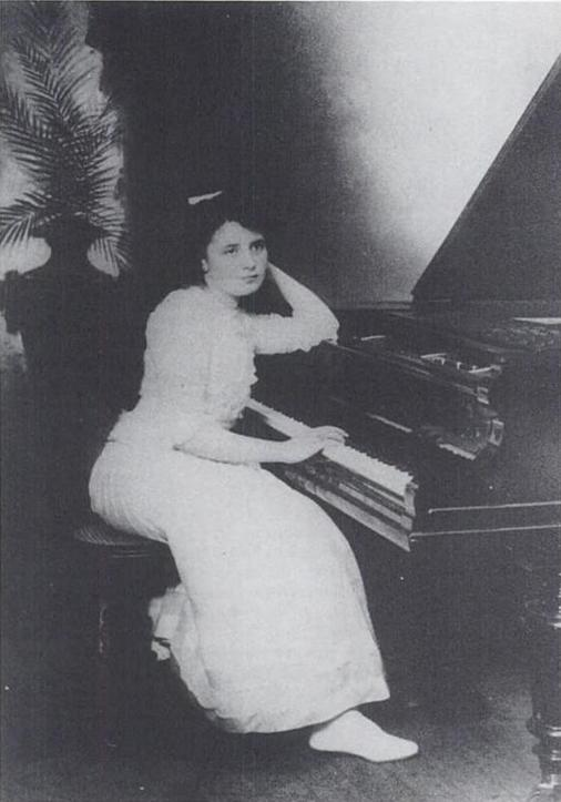 La pianista Rosita Renard durante su presentación en el Salón Alemán de Valparaíso (mayo de 1909).